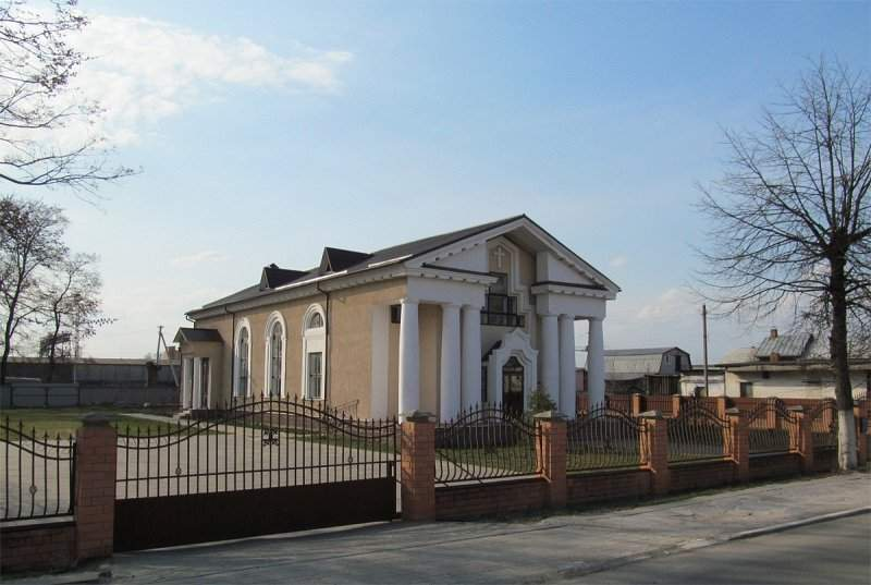 Мікашэвічы. Царква евангелістаў